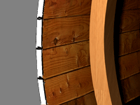 poszycie stykowe -przekrój